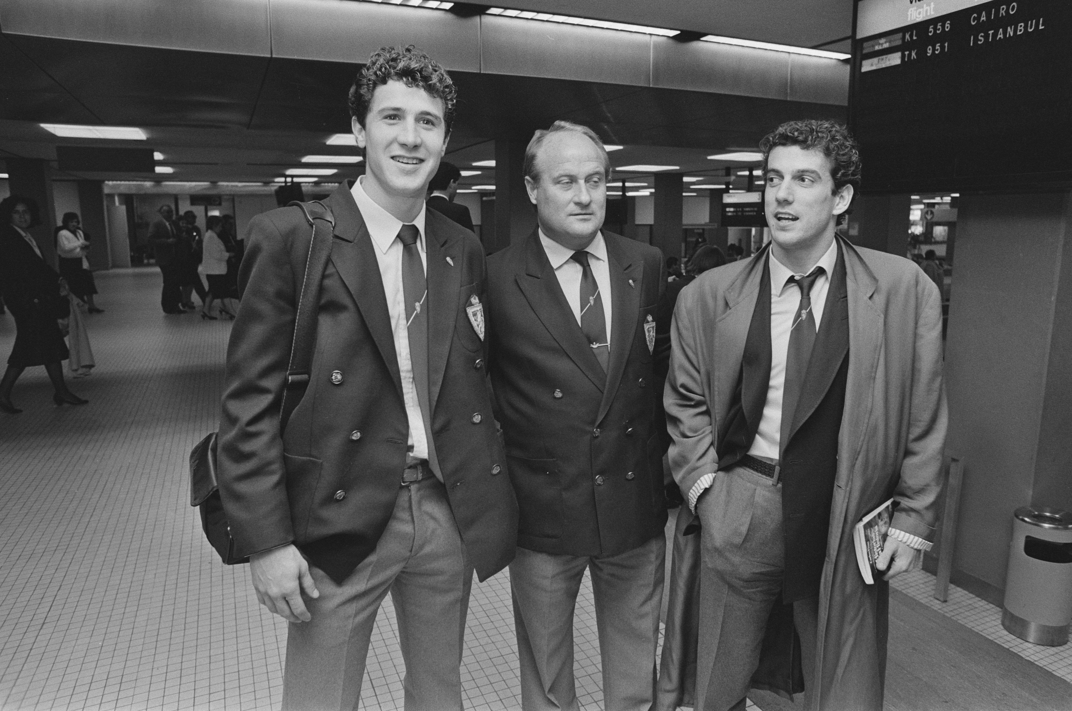 Collectie / Archief : Fotocollectie Anefo Reportage / Serie : [ onbekend ] Beschrijving : Aankomst Real Zaragoza Datum : 21 april 1987 Trefwoorden : sport, voetbal Persoonsnaam : Real Zaragoza Fotograaf : Bogaerts, Rob / Anefo Auteursrechthebbende : Nationaal Archief Materiaalsoort : Negatief (zwart/wit) Nummer archiefinventaris : bekijk toegang 2.24.01.05 Bestanddeelnummer : 933-9579